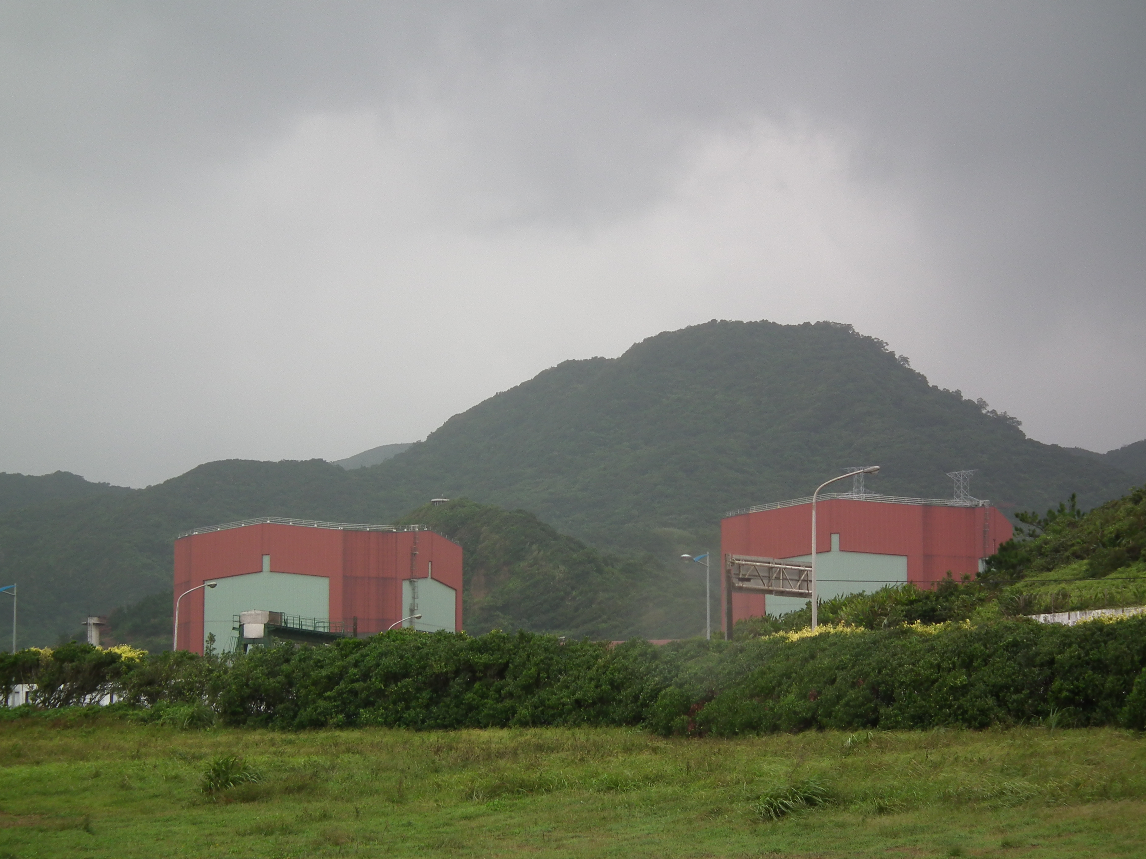 台湾第二原子力発電所